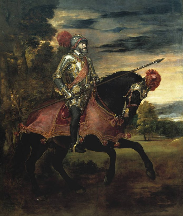 Retrato ecuestre del emperador Carlos I de España (1500-1558), que aparece llevando la armadura que usó en la batalla de Mühlberg, que se libró en 1547 y en la que el emperador derrotó aplastantemente a los protestantes alemanes.